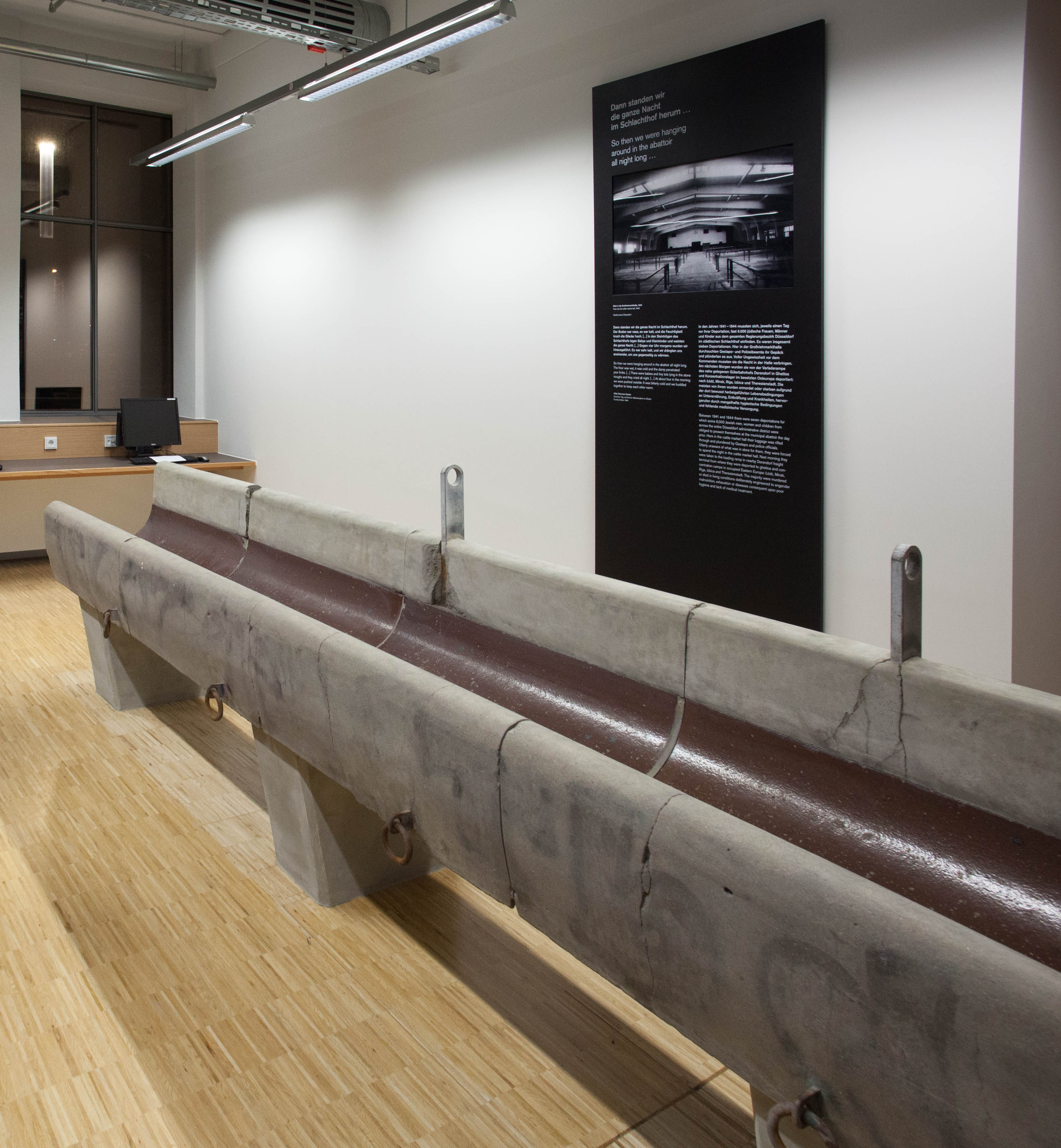 Futtertrog in der Bibliothek der Hochschule Düsseldorf